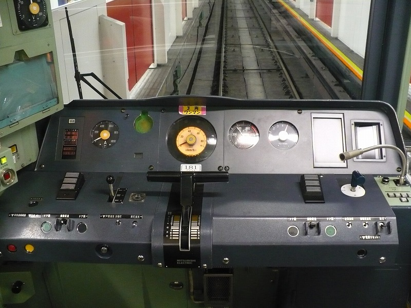 02系の運転台